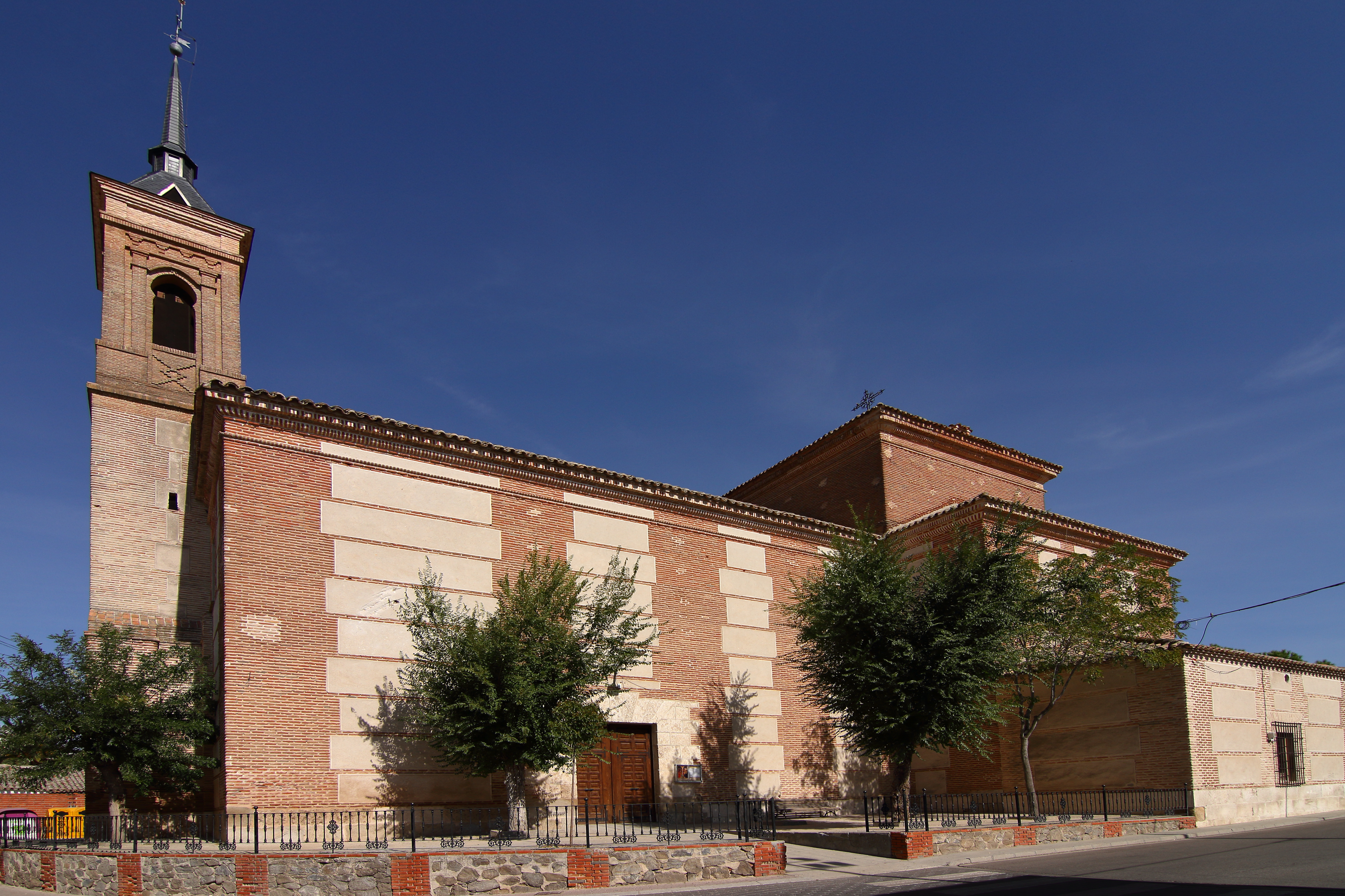 Iglesia de San Esteban Protomártir en Lominchar